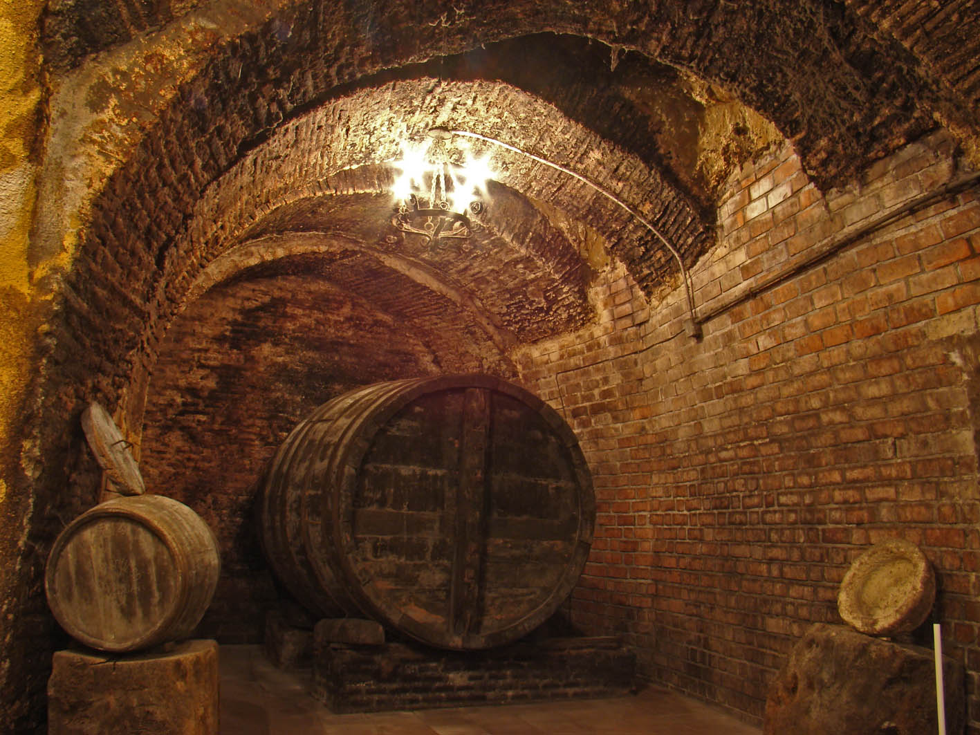 Nava del Rey, provincia de Valladolid, España. Esta localidad tiene el subsuelo horadado de bodegas, algunas de las cuales se pueden visitar.